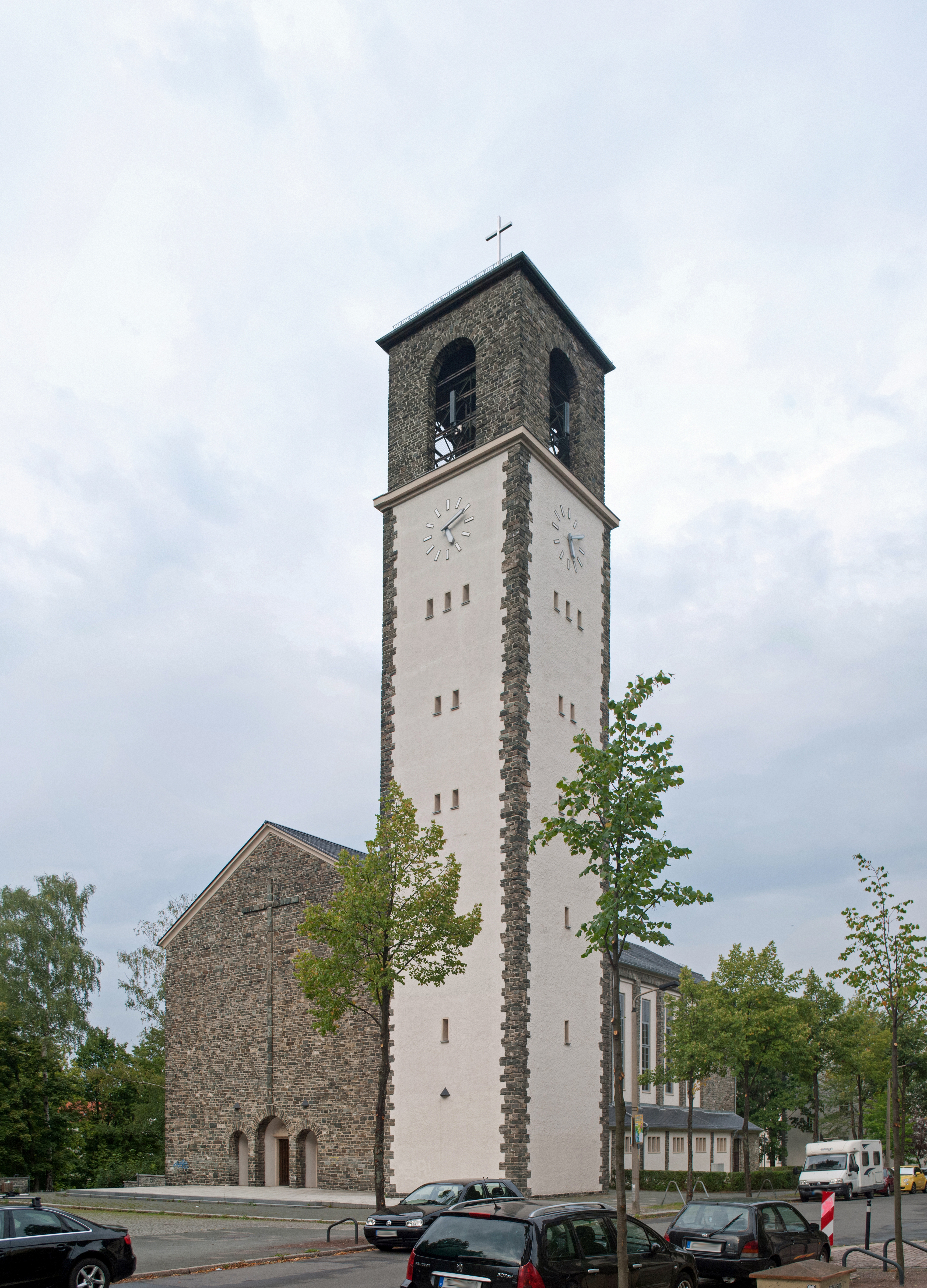 Kreuzkirche Chemnitz. Denkmal und Gebäude in Chemnitz-Kaßberg.